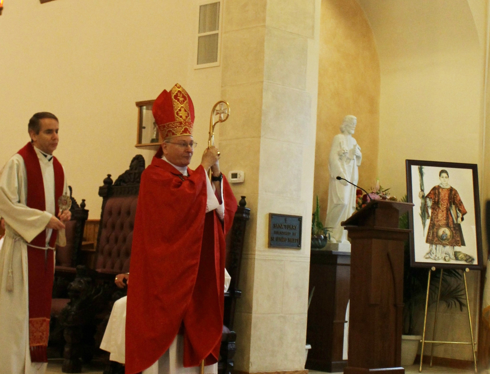 Netcong (Stati Uniti d'America), St Michael's Church: il Vescovo Arthur Joseph Serratelli accanto al reliquiario di San Cesario diacono e martire, e alla nuova icona del santo, 18 Luglio 2015